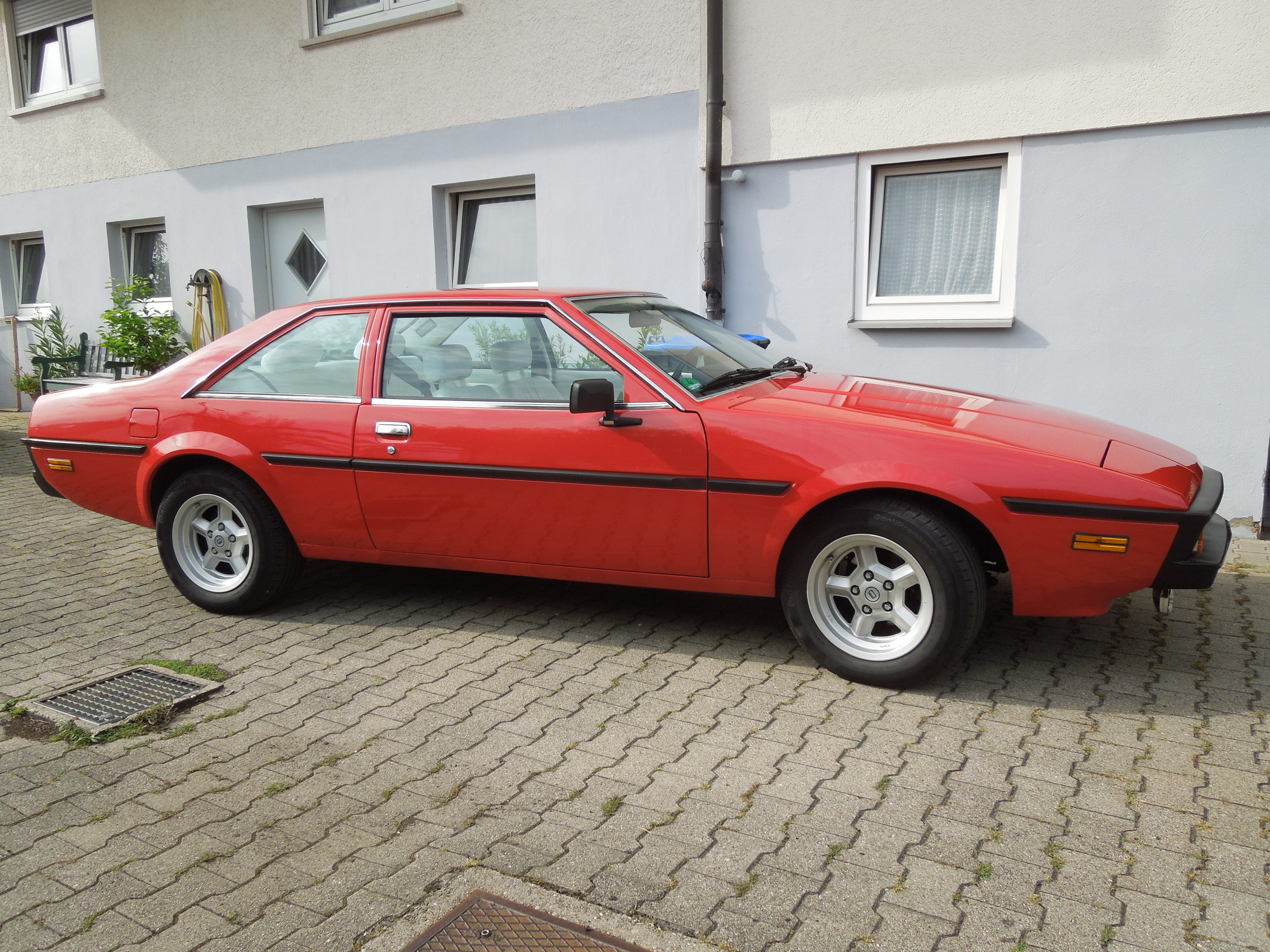 Bitter SC 3.9